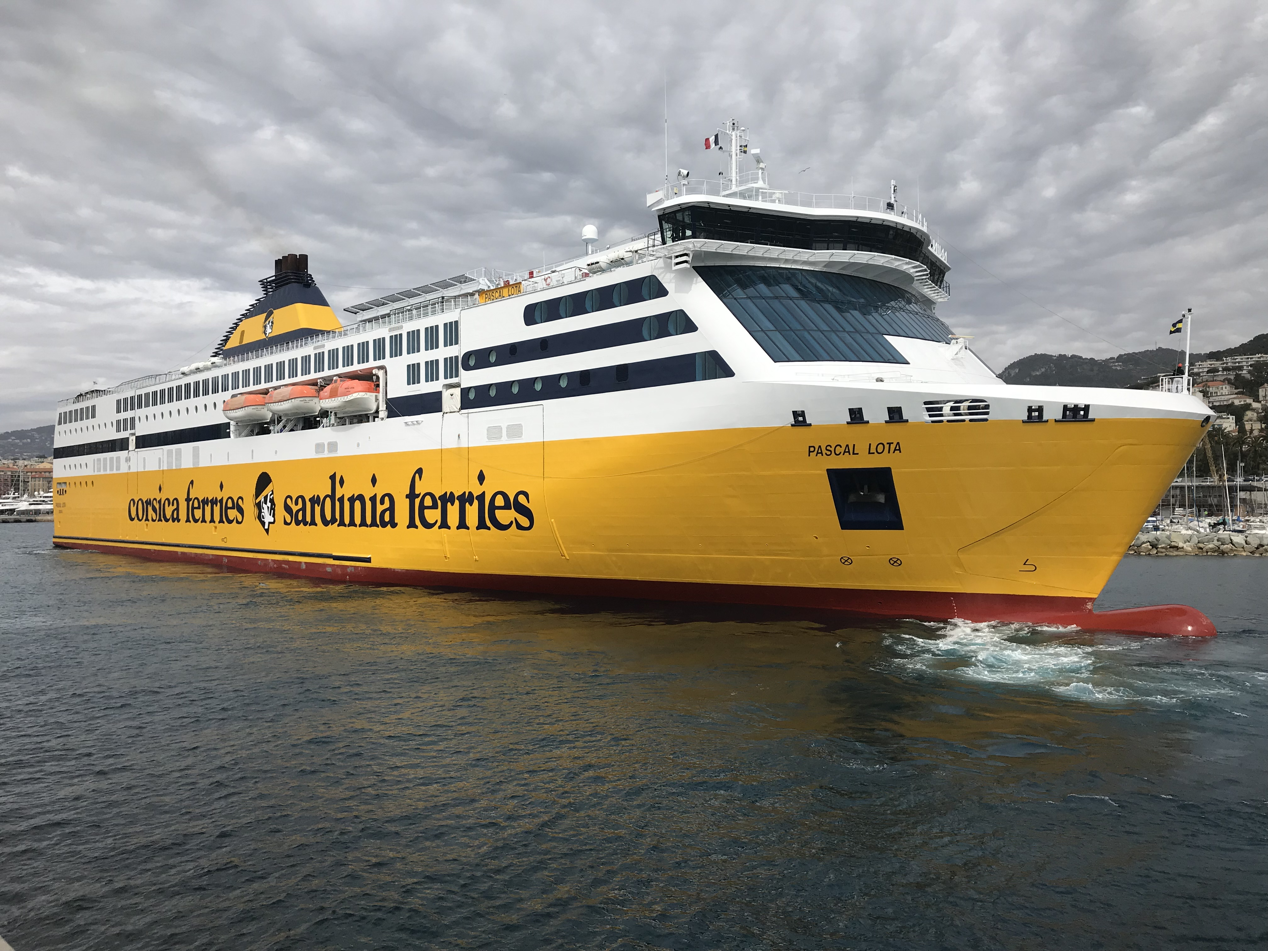 Le car-ferry Pascal Lota du groupe Corsica Ferries - Sardinia Ferries accostant au port de Nice.